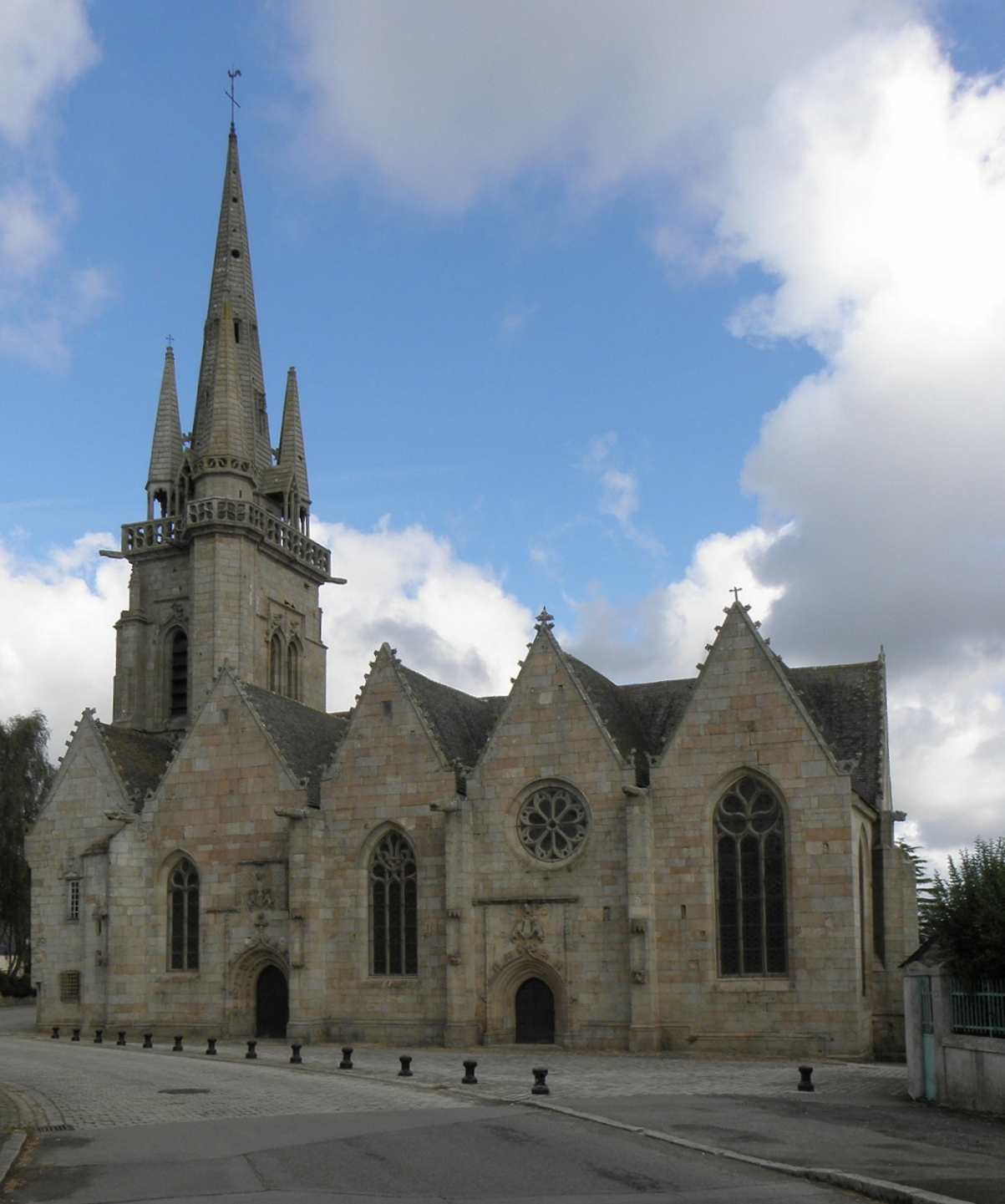 Façade méridionale de l'église Notre-Dame à Grâces (22). .